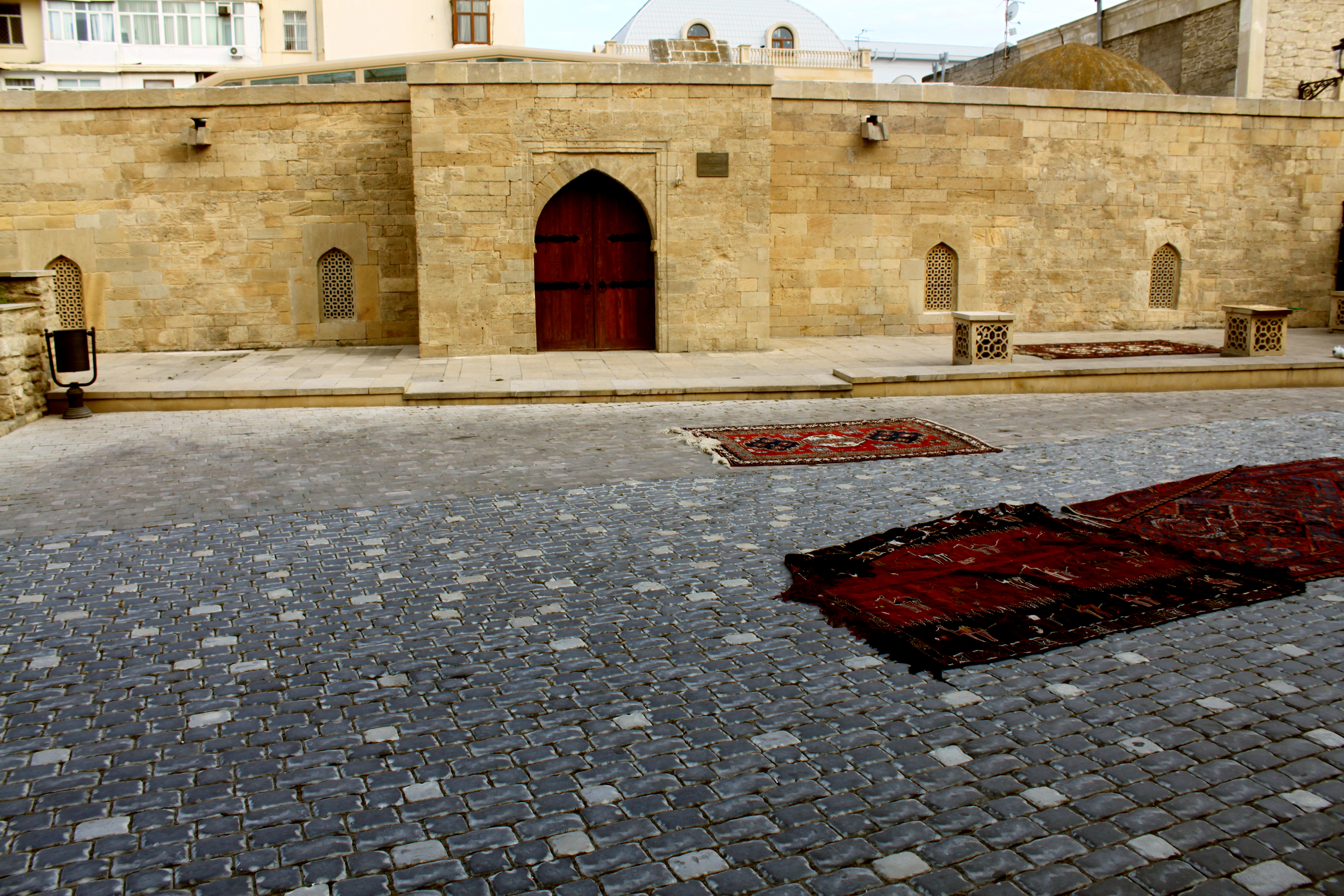 İkimərtəbəli karvansaray